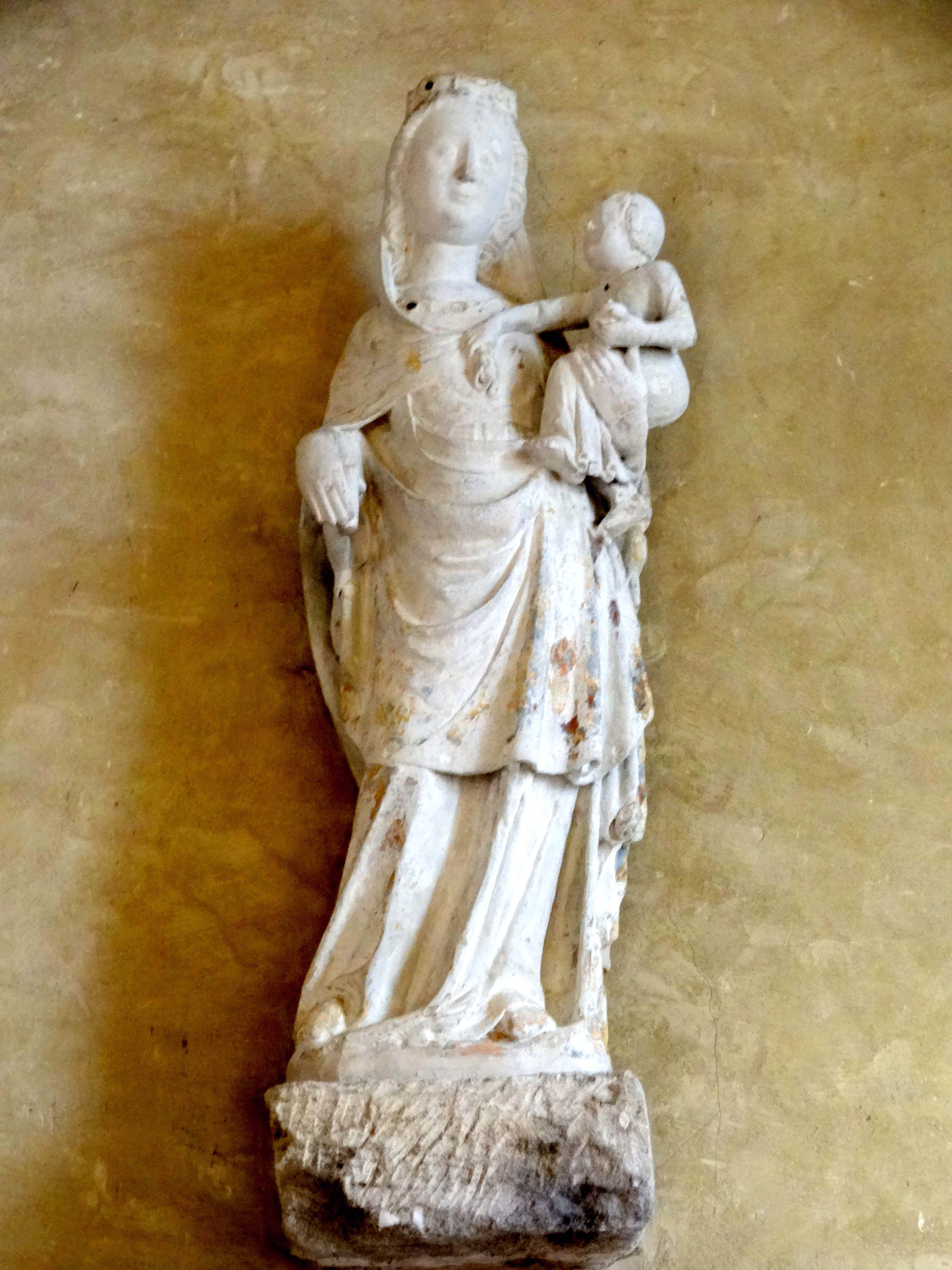 Vierge à l'Enfant du XIVe siècle.